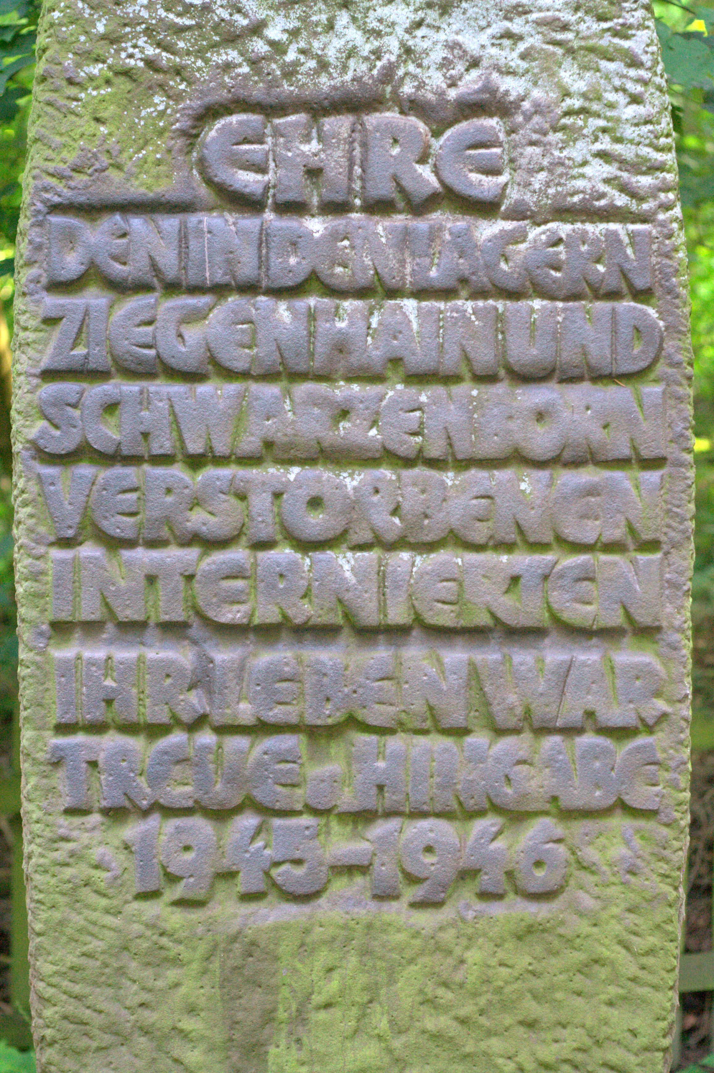 Gedenktafel für die verstorbenen des ehemaligen CIC 95 Ziegenhain